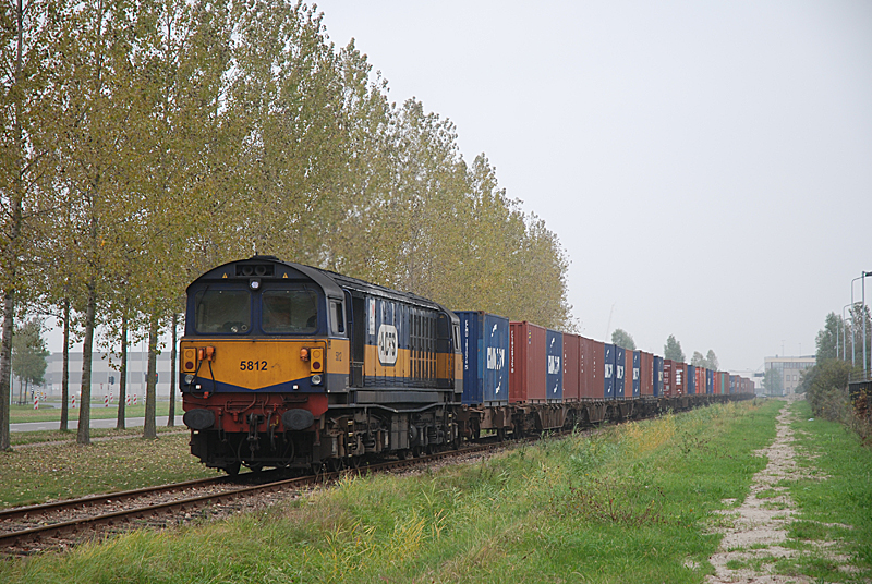 5812 van ACTS te Amsterdam Houtrakpolder Class 58 goods engine operated by ACTS at Amsterdam Houtrakpolder